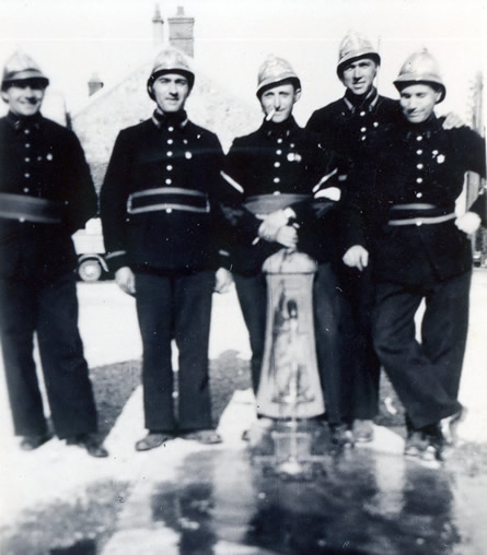 photographie de pompiers à Esmans